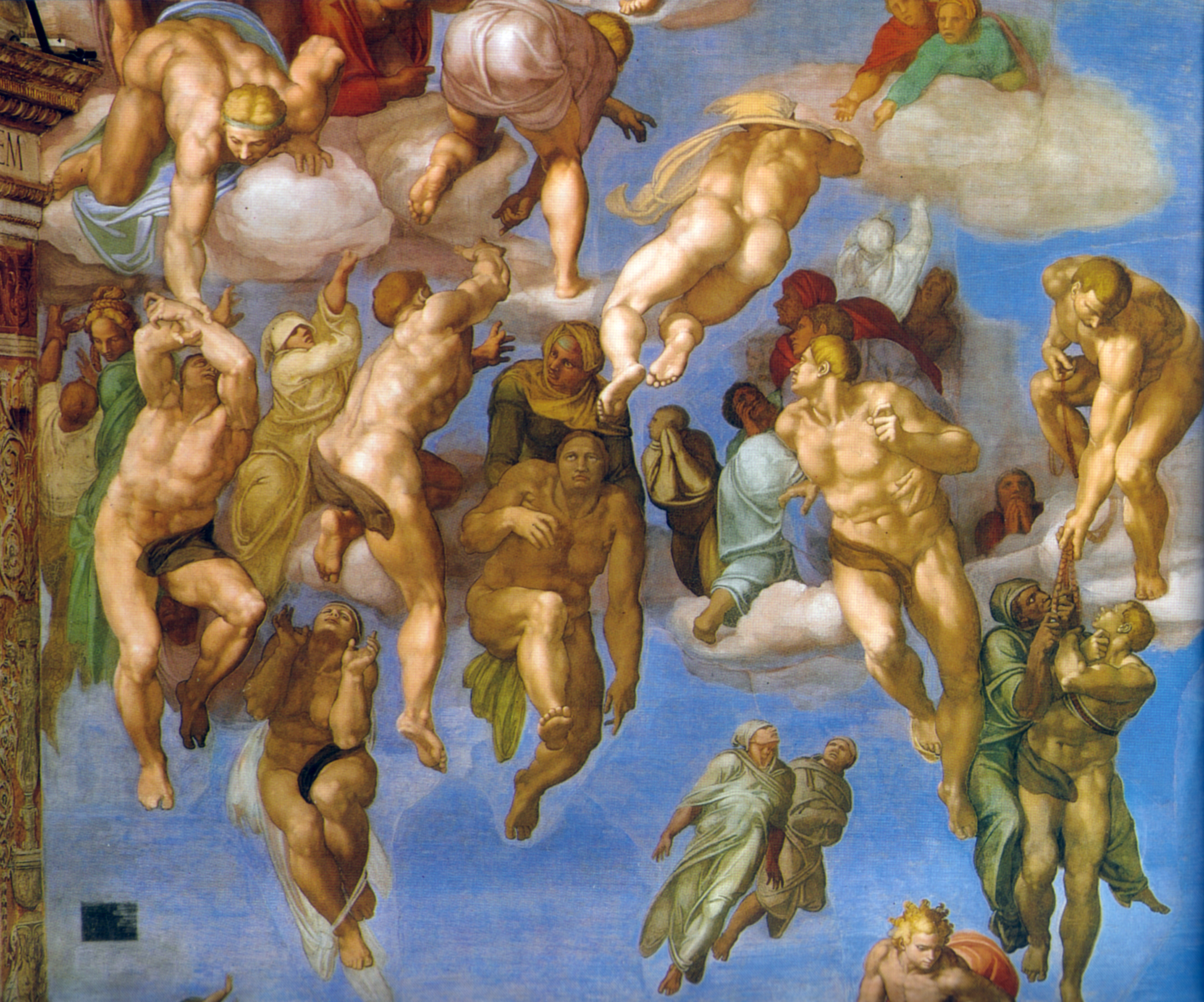 MICHELANGELO Buonarroti Last Judgment Fresco, 1370 x 1220 cm Cappella Sistina, Vatican